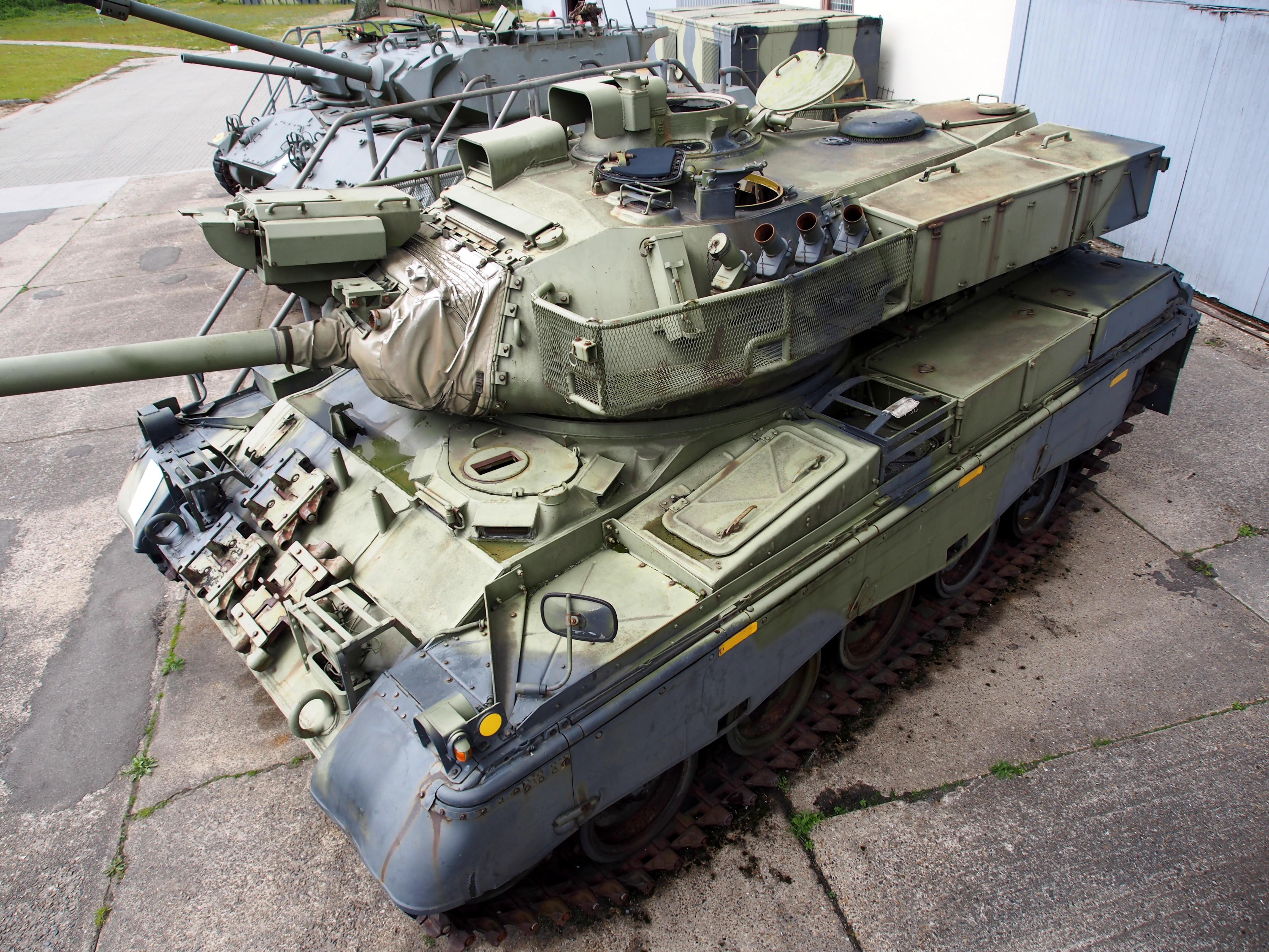 Photographed at Aalborg, Denmark.